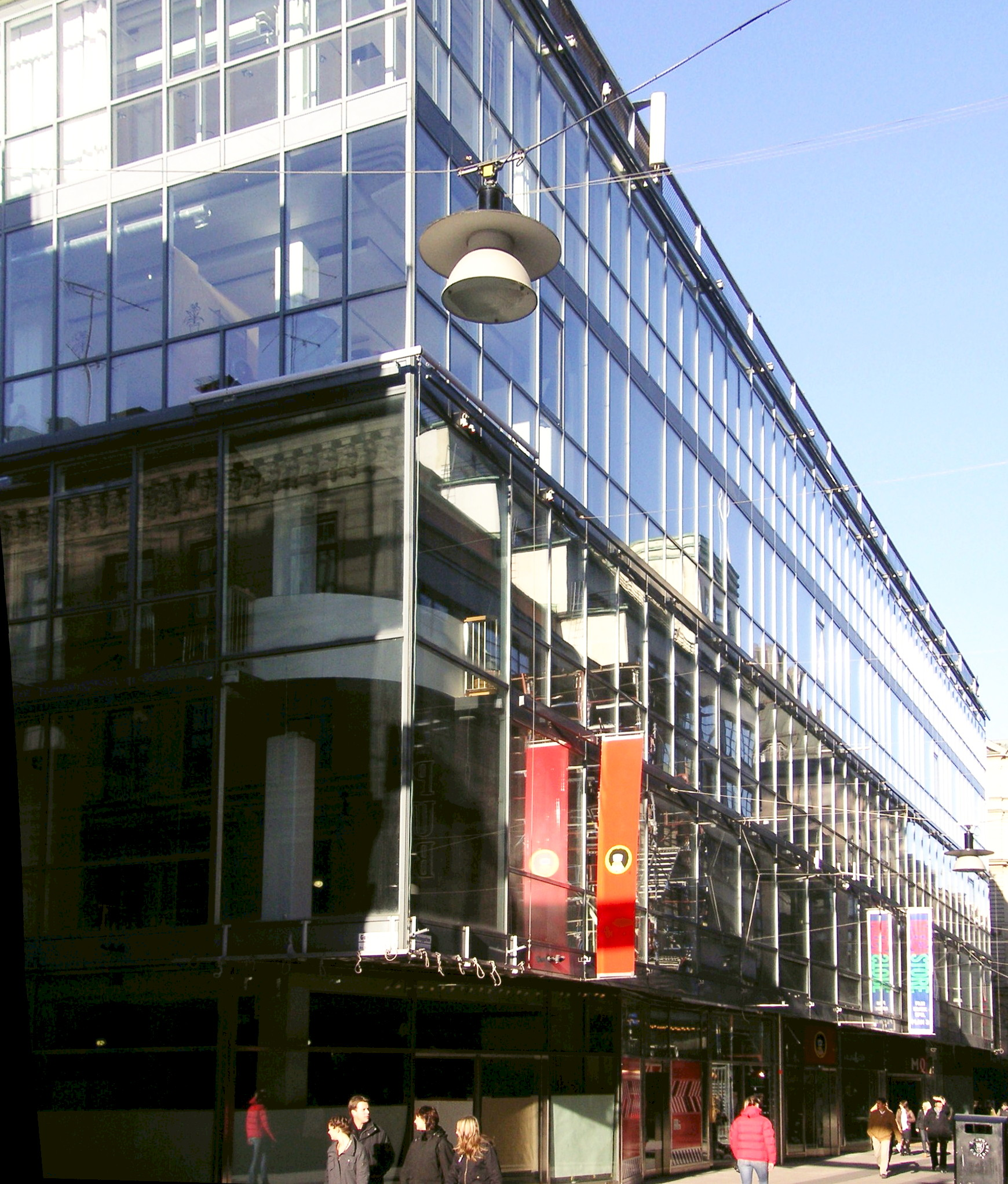 Det s.k. "Bohagshuset", vilket ursprungligen ingick i varuhuskomplexet PUB, Stockholm. Byggår 1956-59, arkitekter E Ahlsén och T Ahlsén.